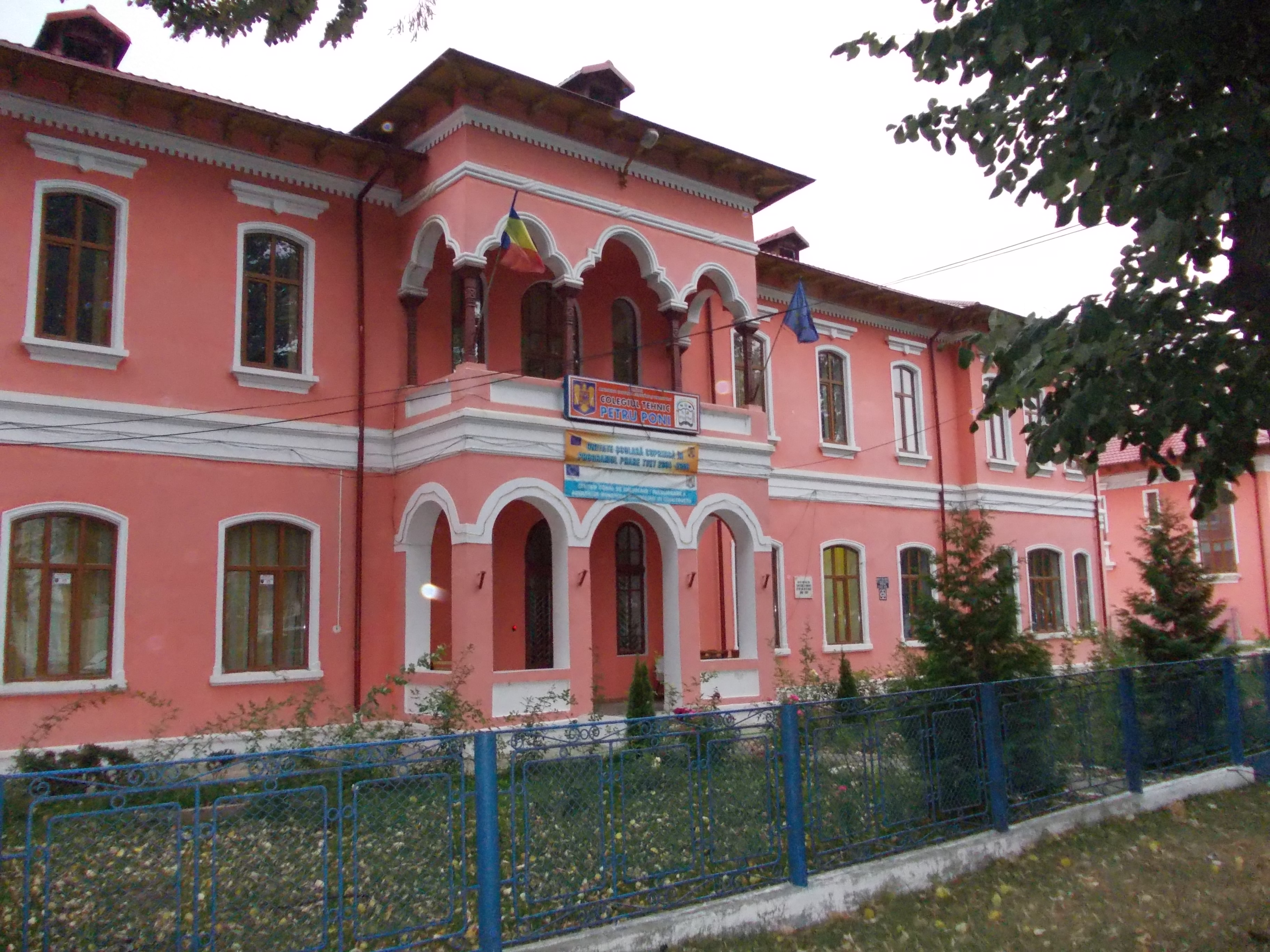 Școalade Arteși meserii, azi Liceul nr. 3